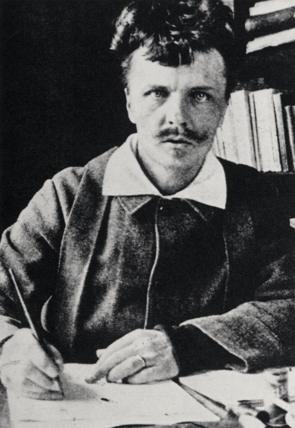 Strindberg, August: Strindberg an seinem Arbeitstisch, Gersau [1]